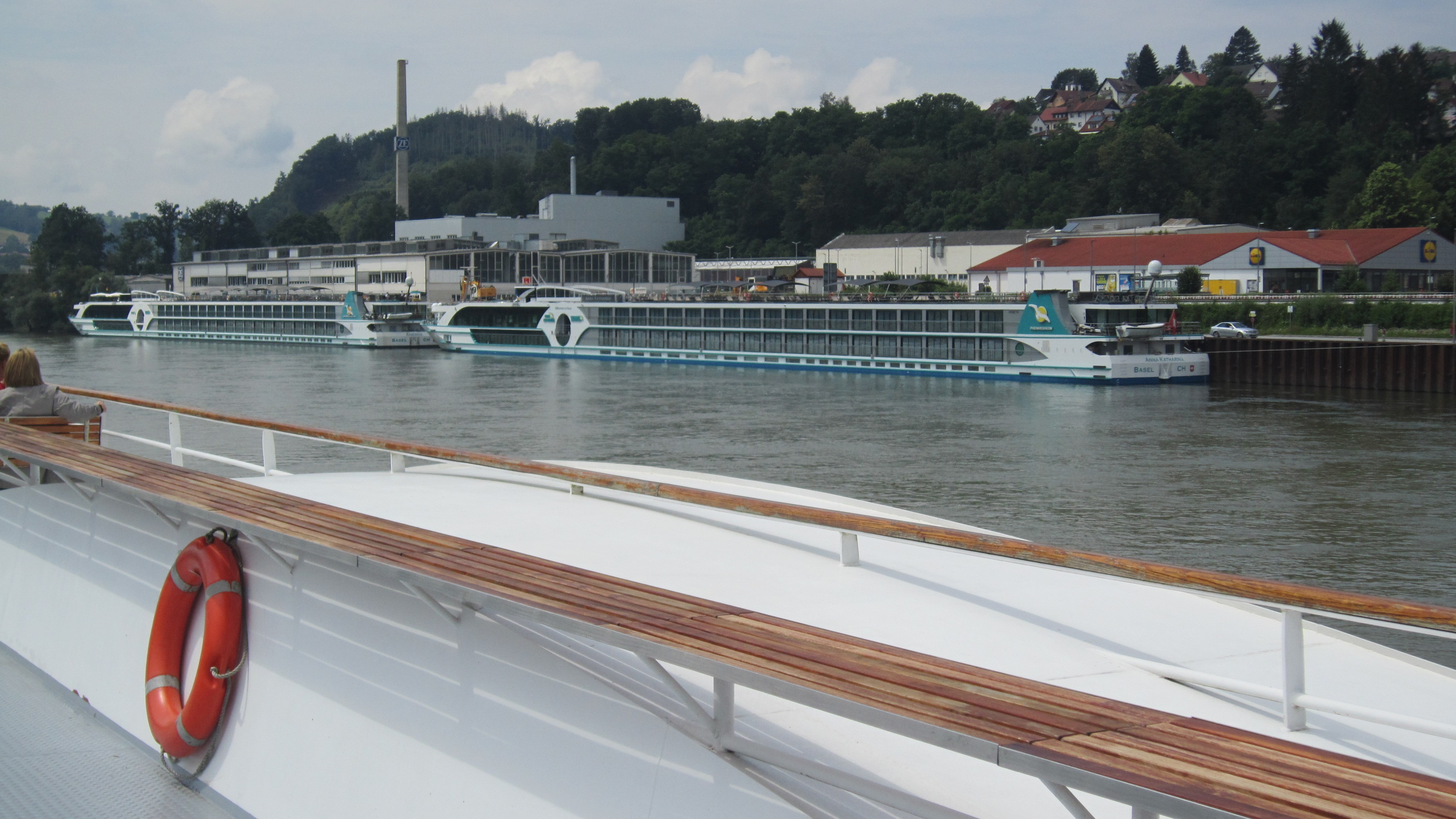 Zwei von vielen Flusskreuzfahrtschiffen, die während der COVID-19-Pandemie nicht benötigt wurden. Sie wurden kurz hinter der letzten deutschen Eisenbahnbrücke über die Donau abgestellt.